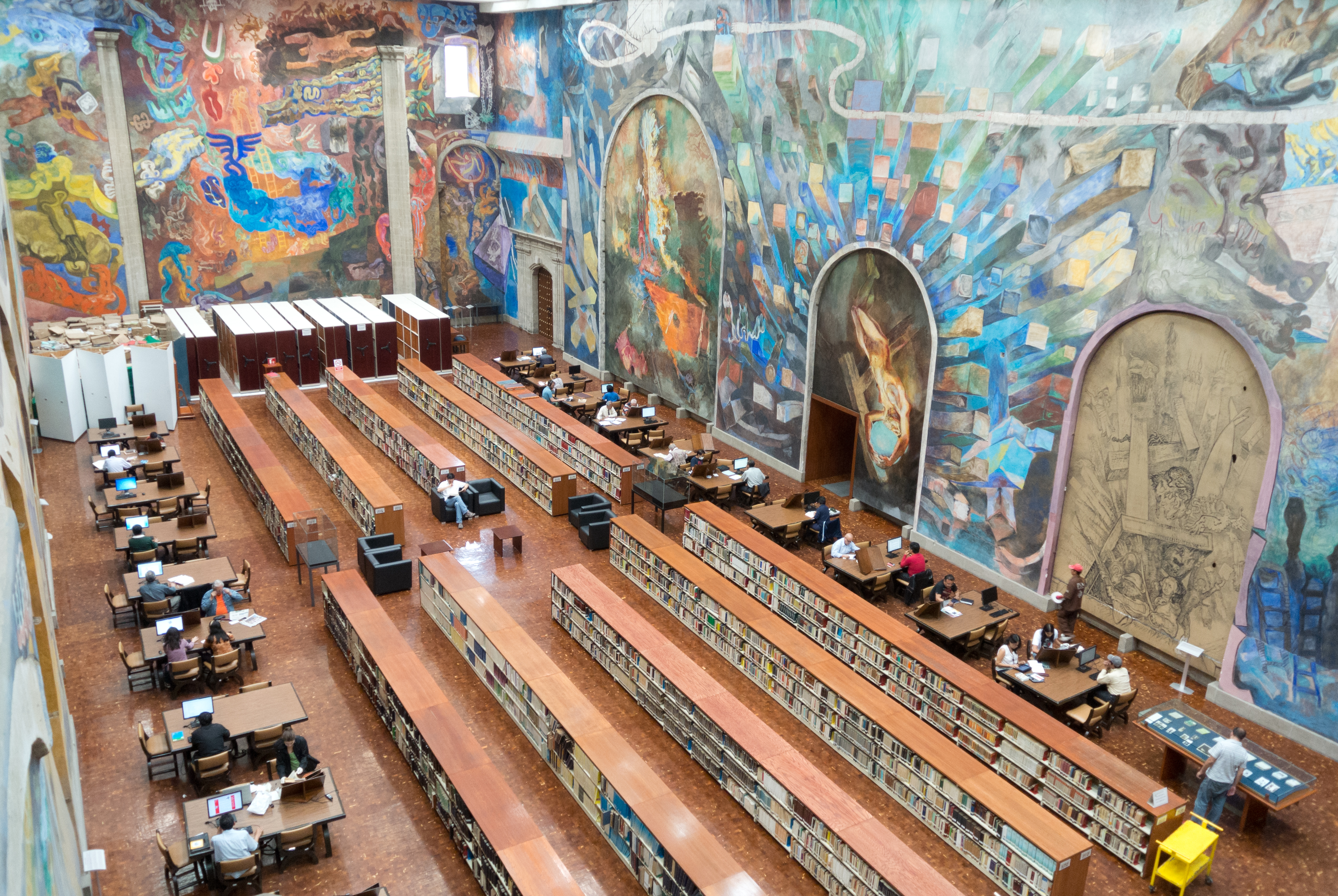 Biblioteca Miguel Lerdo de TejadaNikon 1 J1 + 1 Nikkor VR 10-30mm f/3.5-5.6